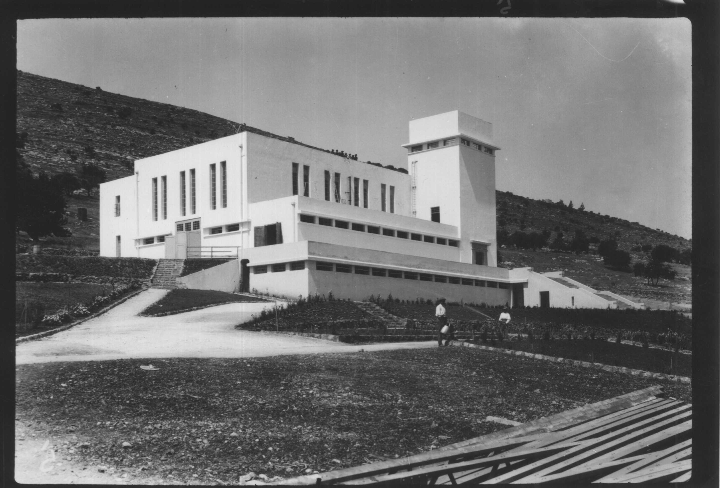 תיעוד תחנת הכוח הראשונה בחיפה